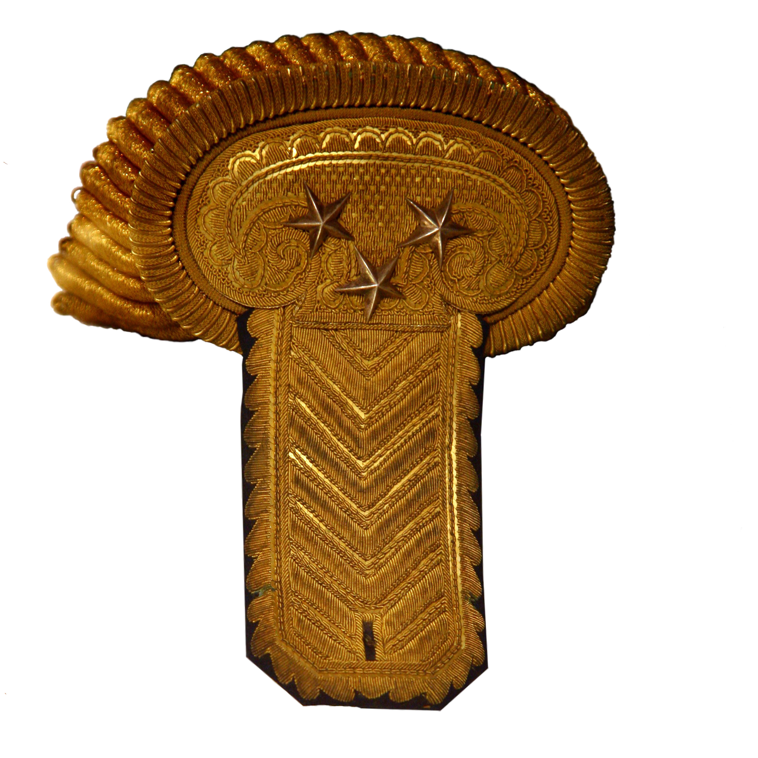 Épaulette d'un général de division